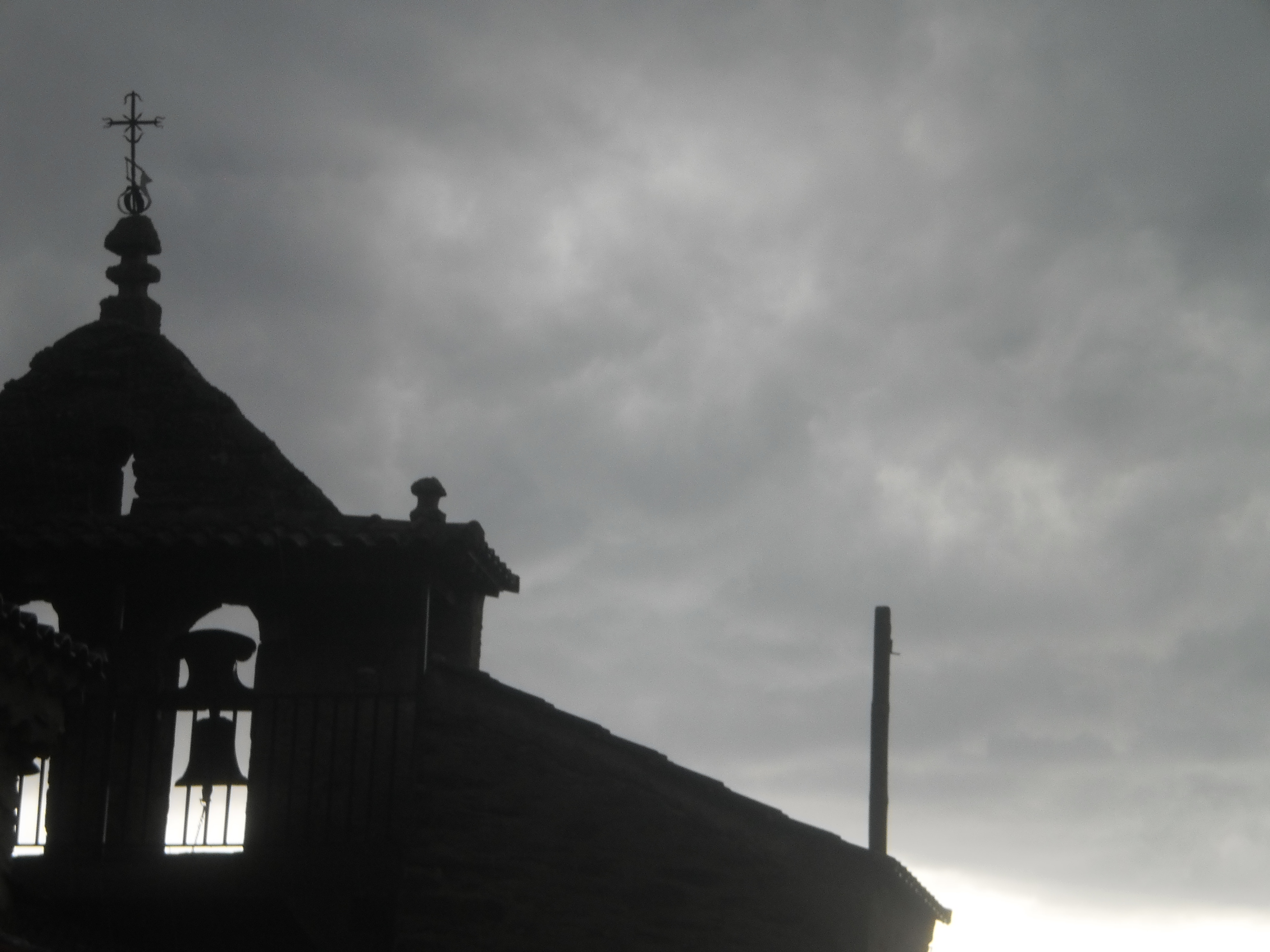 Iglesia de San Mamed un día de granizo